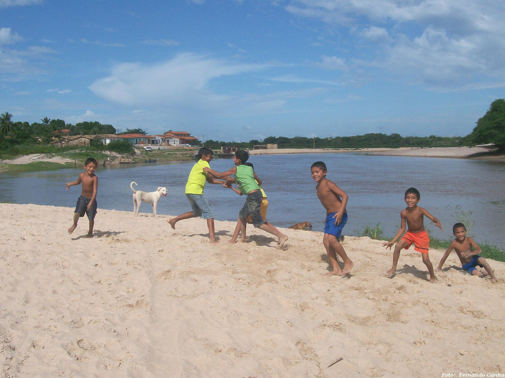 Garotos brincando as margens do rio Pindaré. Alto alegre do Pindaré. Maranhão, Brasil.